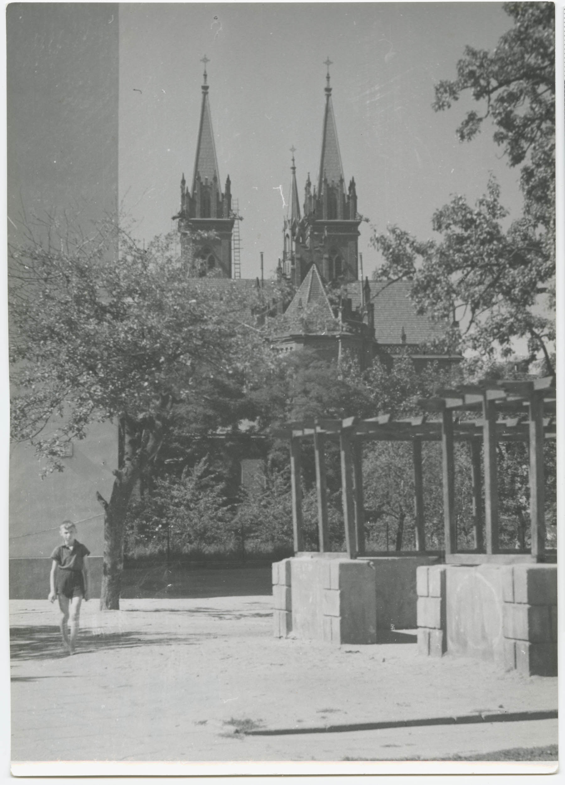 Fotografia Ignacego Płażewskiego przedstawiająca fragment skweru pomiędzy blokami przy ulicy Wojska Polskiego z widokiem na wieże kościoła pw. Wniebowzięcia Najświętszej Maryi Panny stojącego na Placu Kościelnym. Przed 1888 r. mieścił się tam drewniany kościół parafialny pod tym samym wezwaniem (przeniesiony w 1888 r. na ul. Ogrodową 22, ob. kościół pw. św. Józefa Oblubieńca Najświętszej Maryi Panny). Wraz z rozwojem demograficznym i gospodarczym kościół stał się on niewystarczający dla wiernych. Decyzję o budowie nowej świątyni podjęto w latach 80. XIX wieku a projekt w stylu neogotyckim (a dokładniej tzw. „gotyk wiślano-bałtycki”) wykonał warszawski architekt Konstanty Wojciechowski. Budowa rozpoczęła się w 1888 r., by już w dwa lata później świątynia była gotowa w stanie surowym. Wykończenia trwały do 1897 r. i dopiero w tym roku dokonano jego konsekracji.